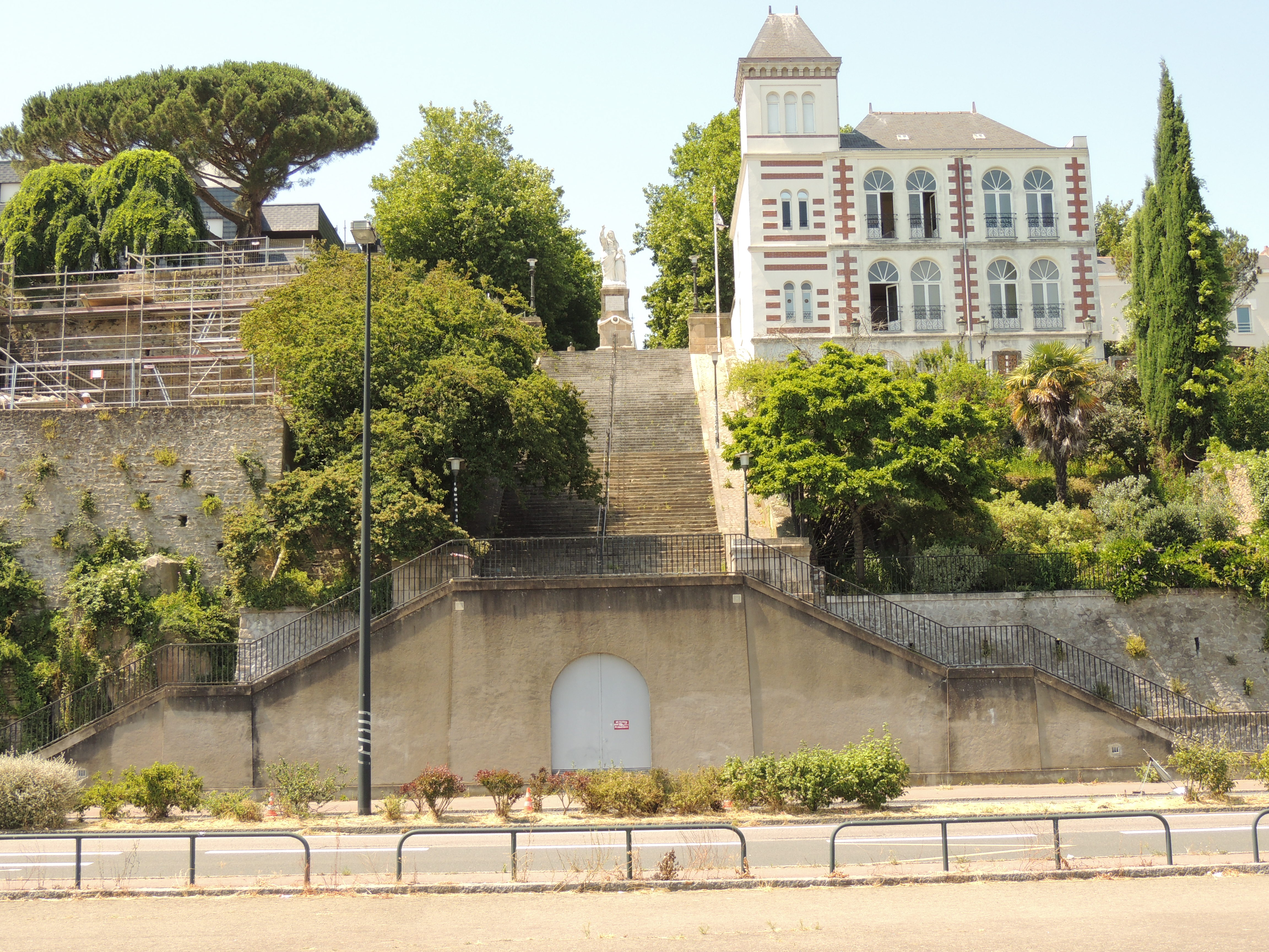 Escalier Sainte-Anne à Nantes, en France, vu du quai Marquis-d'Aiguillon